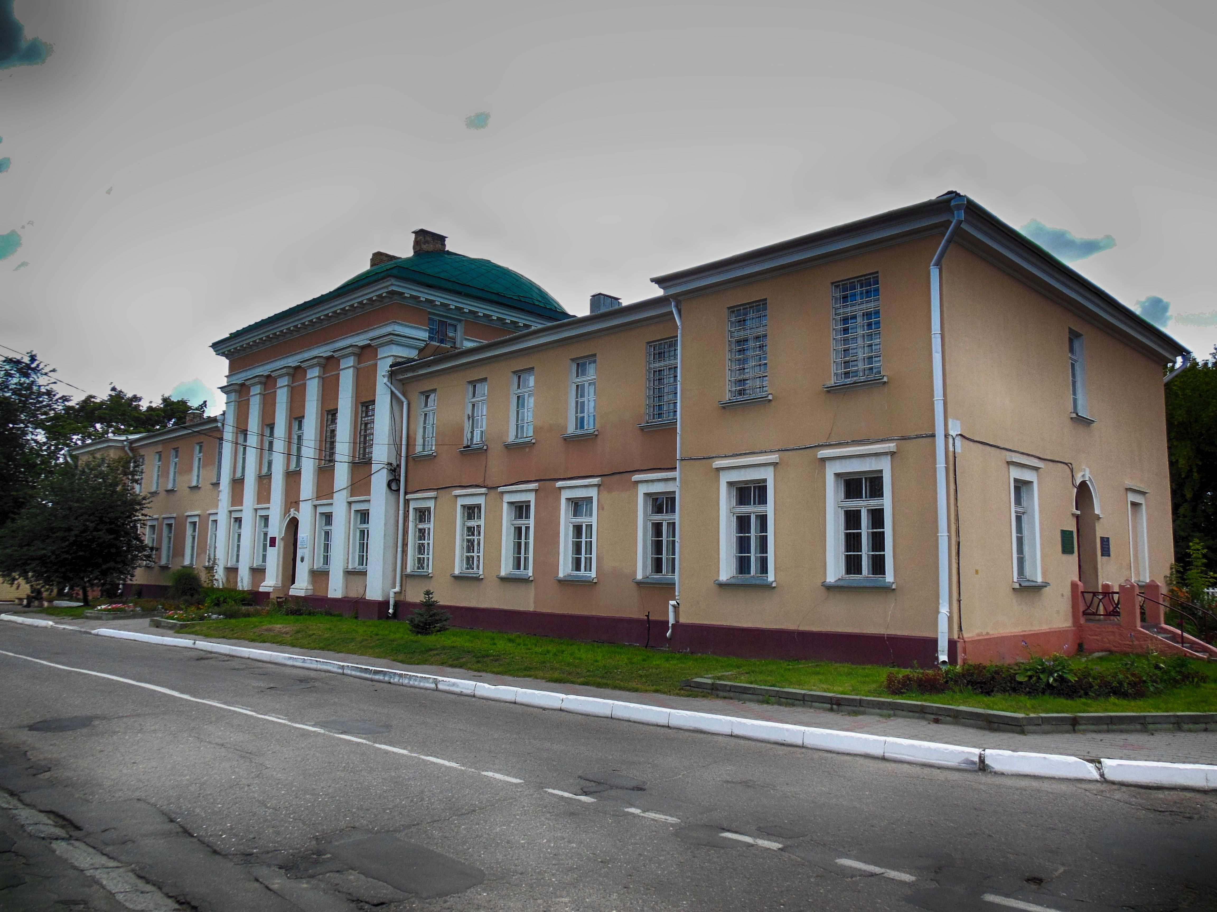 Беларуская (тарашкевіца): Ансамбль былой рэзыдэнцыі графаў Тышкевічаў: галоўны корпус два флігелі фрагмэнты парку. г. Валожын This is a photo of Belarusian heritage monument. Reference number: 612Г000075 ( WLM)